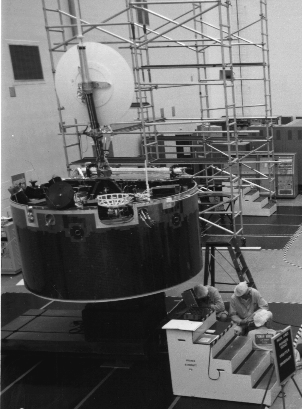 PIONEER VENUS 1 SPACECRAFT BEING VIEWED BY NEWS MEDIA REPRESENTATIVES